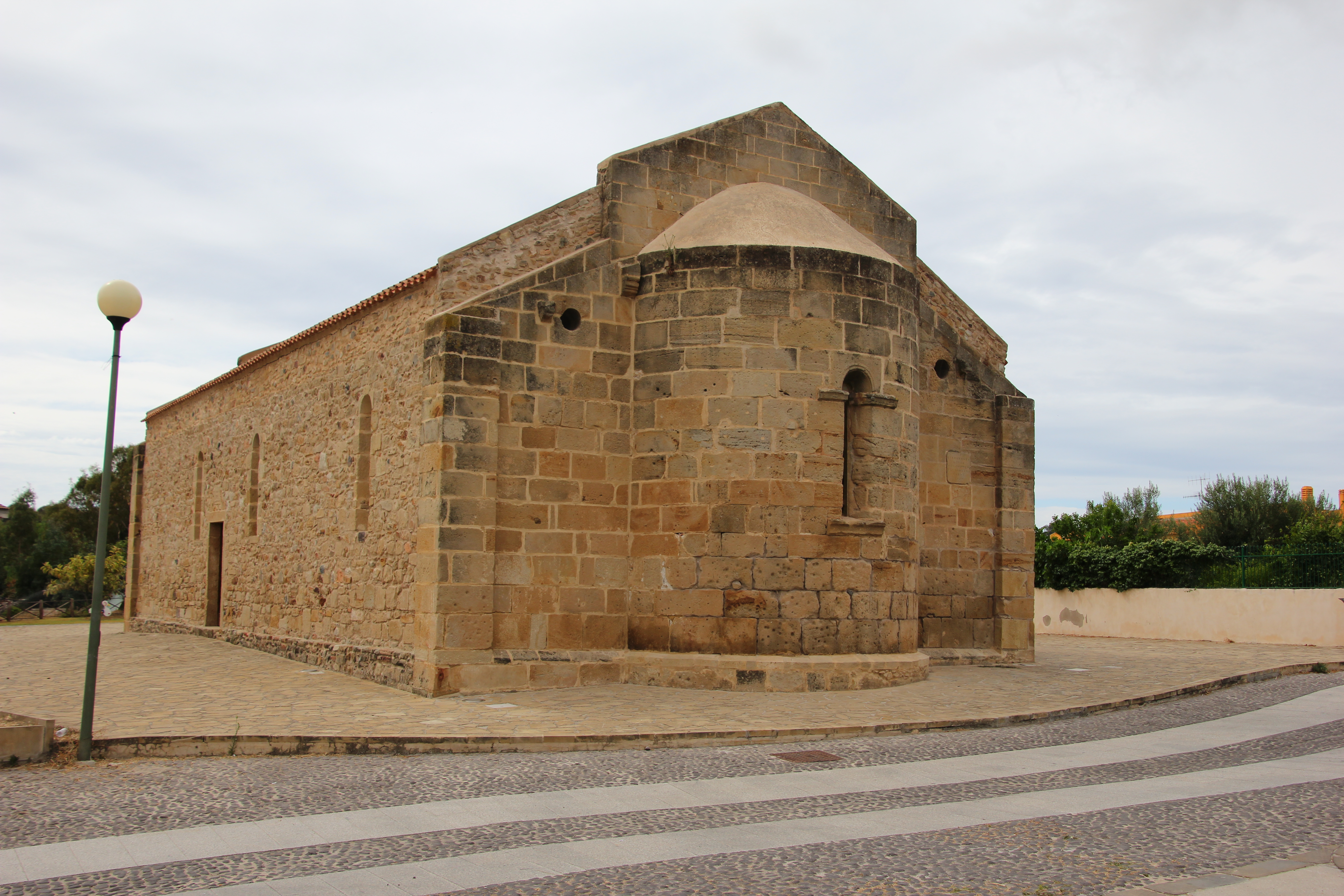 Viddalba - Chiesa di San Giovanni Battista